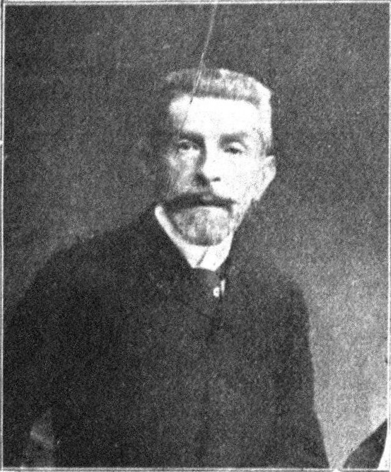 Österreichischer Politiker, Reichsratswahl 1907, Name siehe Dateiname